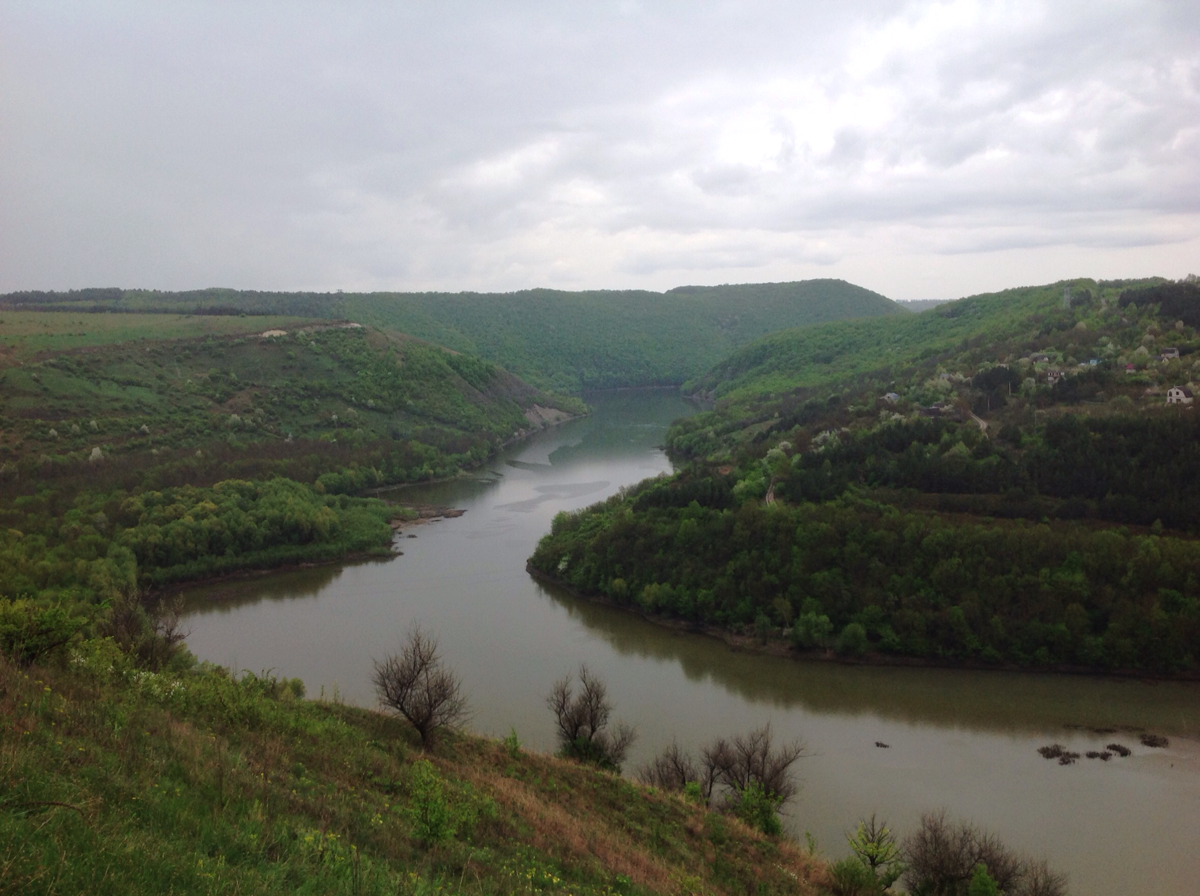 Китайгородське відслонення у долині ріки Тернава, 2015 р. Пам'ятка природи України 68-224-5027